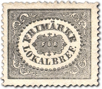 Det svarta lokalfrimärket såldes endast i Stockholm och har endast mycket sällsynt använts i andra städer. Lokalbrevavgiften inom Stockholm var 2 skilling banco. Normalt var att avsändaren satte på ett märke och mottagaren betalade den andra skillingen kontant. Det var också möjligt att förse brevet med två märken. Då kunde försändelsen överlämnas till adressaten utan kostnad. Utbärningsavgiften var betald i förväg. Upplaga: 1 614 500, 1 skilling banco, senare 3 öre. Märkena framställdes utan vattenmärke (endast i arkmarginalerna). Ogiltigt till frankering fr. o. m. den 30 december 1910.